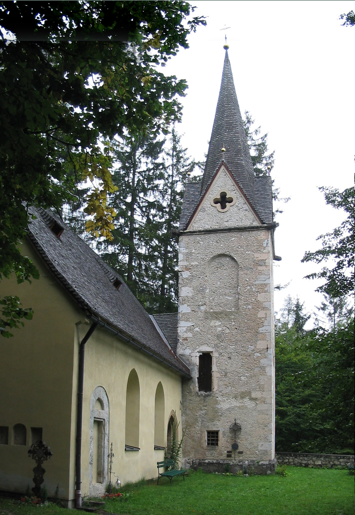 The smaller and (now) older church on St. Georgenberg, Kirche Unserer Lieben Frau unter der Linde (1230).